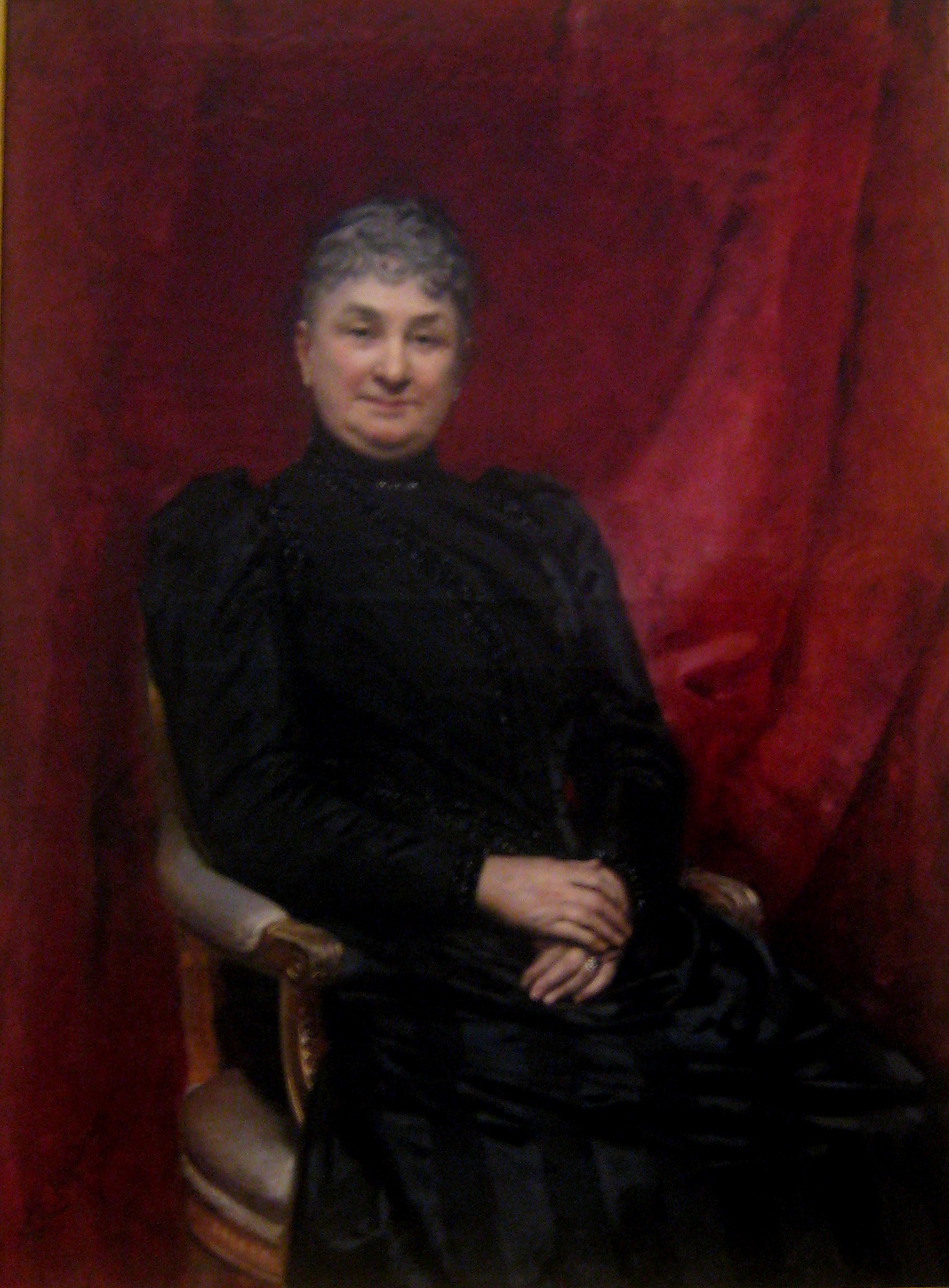 Retrato de María del Carmen Terry y Dorticós († 1926), primera marquesa de Perinat.